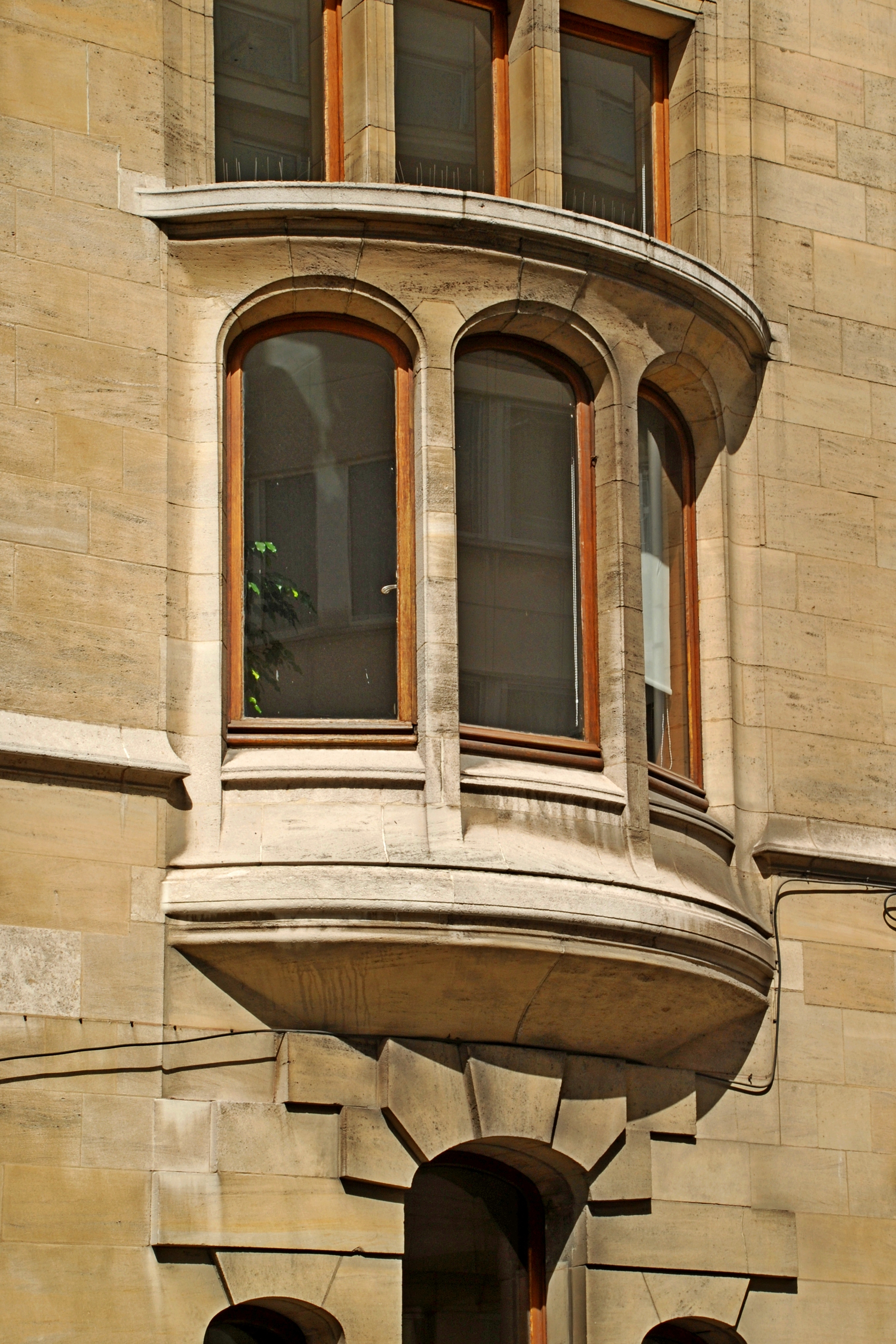 Belgique - Bruxelles - Hôtel Otlet